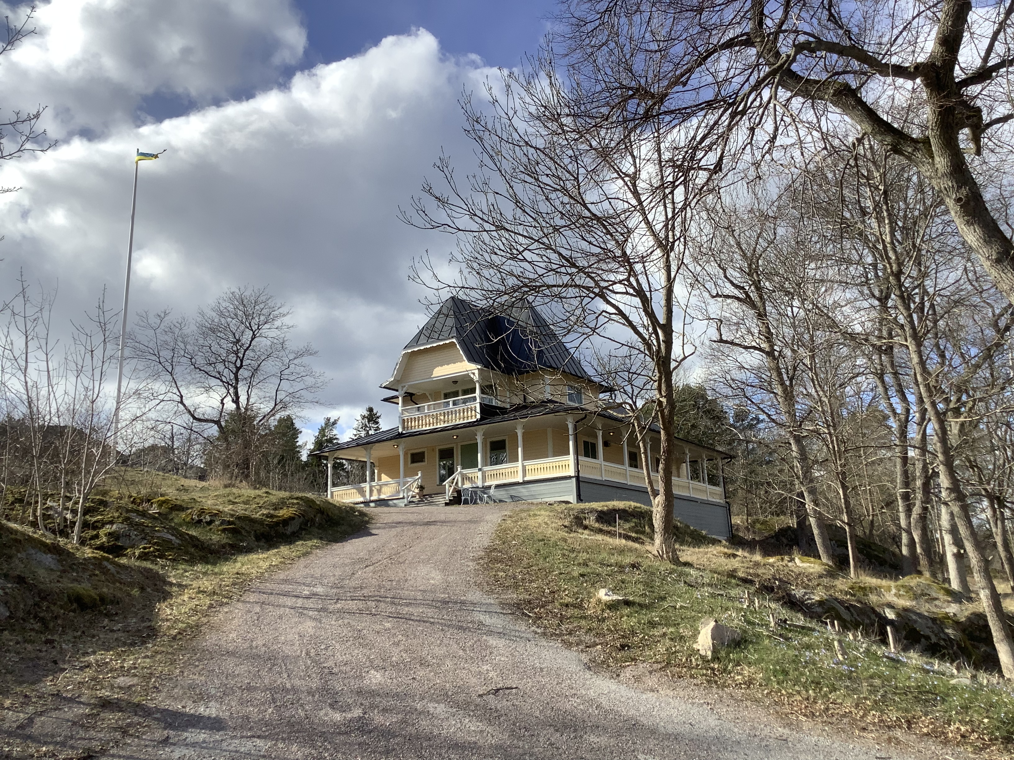 Societetshuset i Trosa